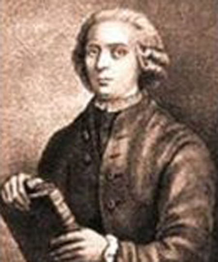 Manuel de Zumaya